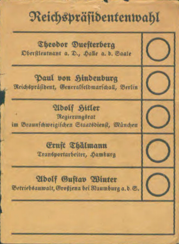 Original-Wahlzettel